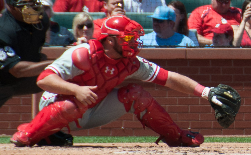 Cameron Rupp